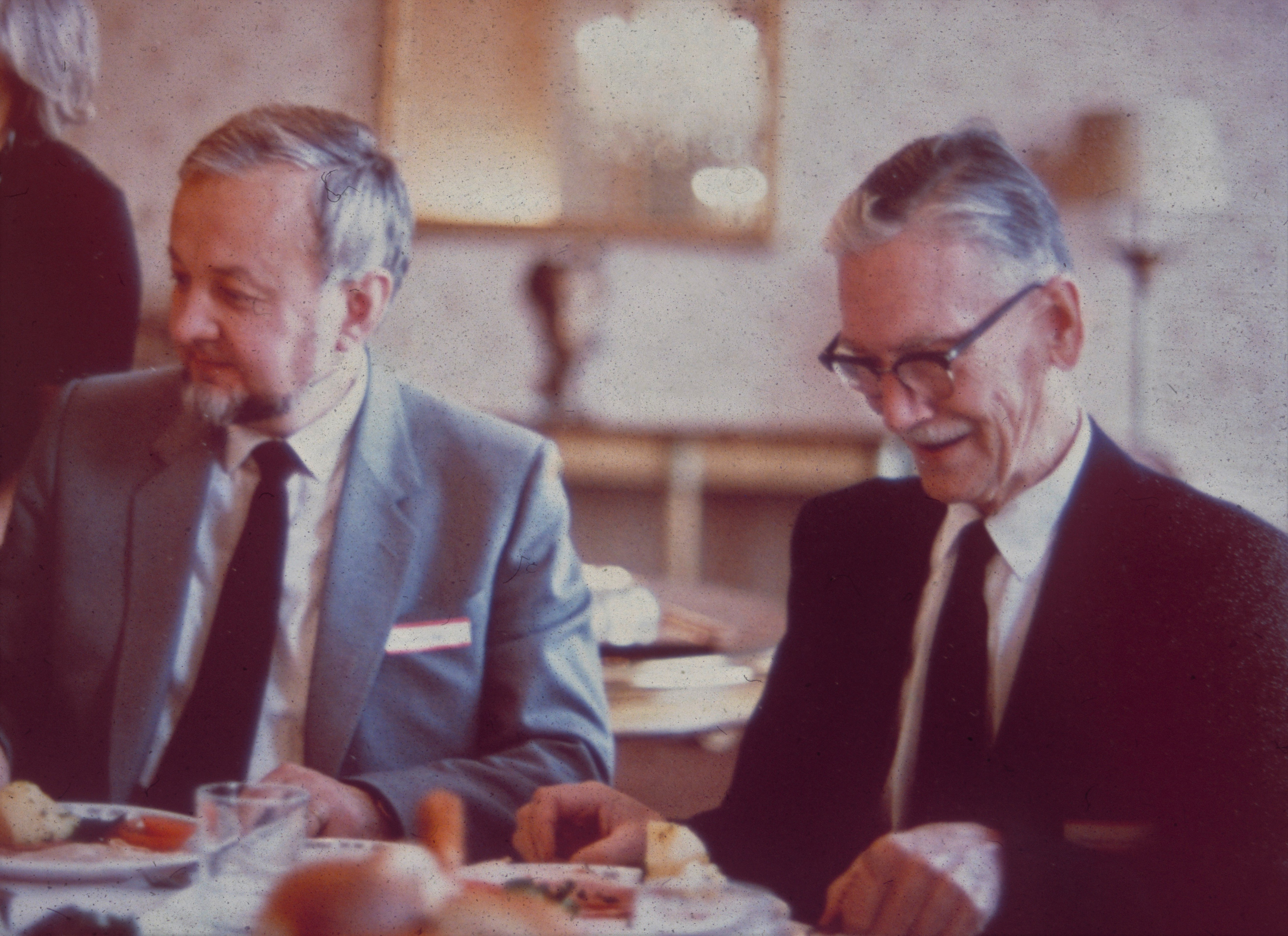 Peter Oehme (links), Ulf von Euler (Stockholm 1976)